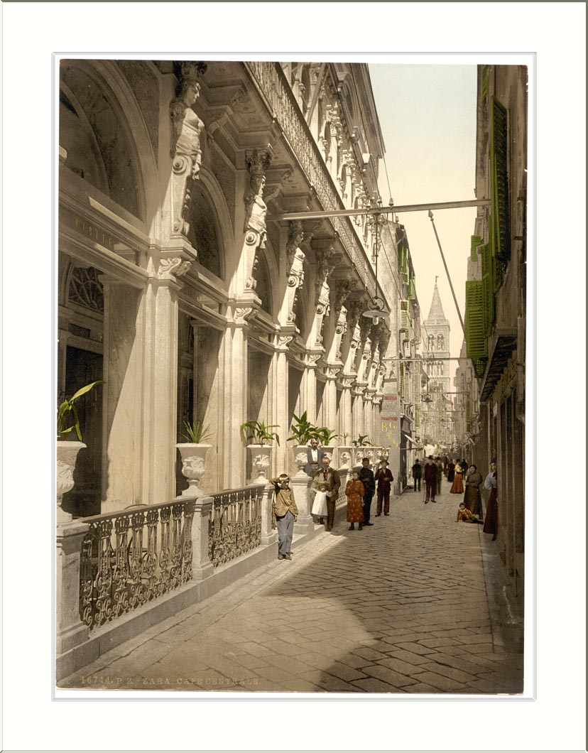 Zara Caffè Centrale Dalmatia Austro-Hungary